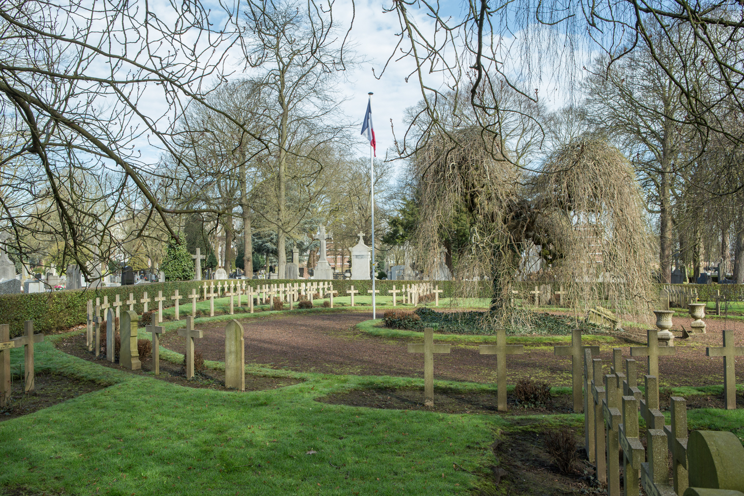 Cimetière du Lille-Sud